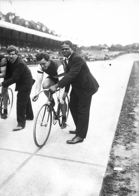 Edmond Jacquelin [cycliste] lancé par Sam mac Vea [boxeur]